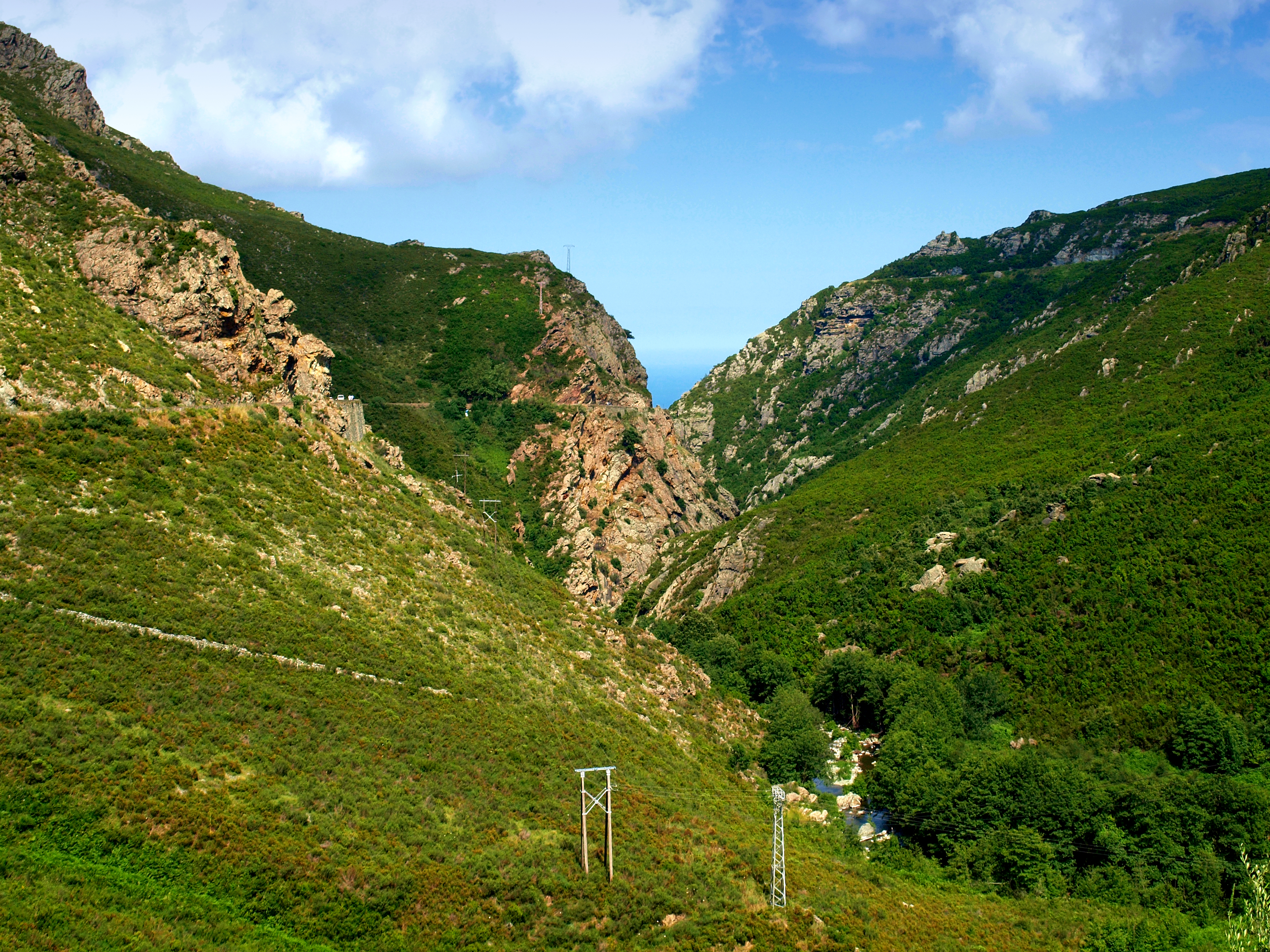 Olmeta-di-Tuda (Corsica) - Défilé du Lancone